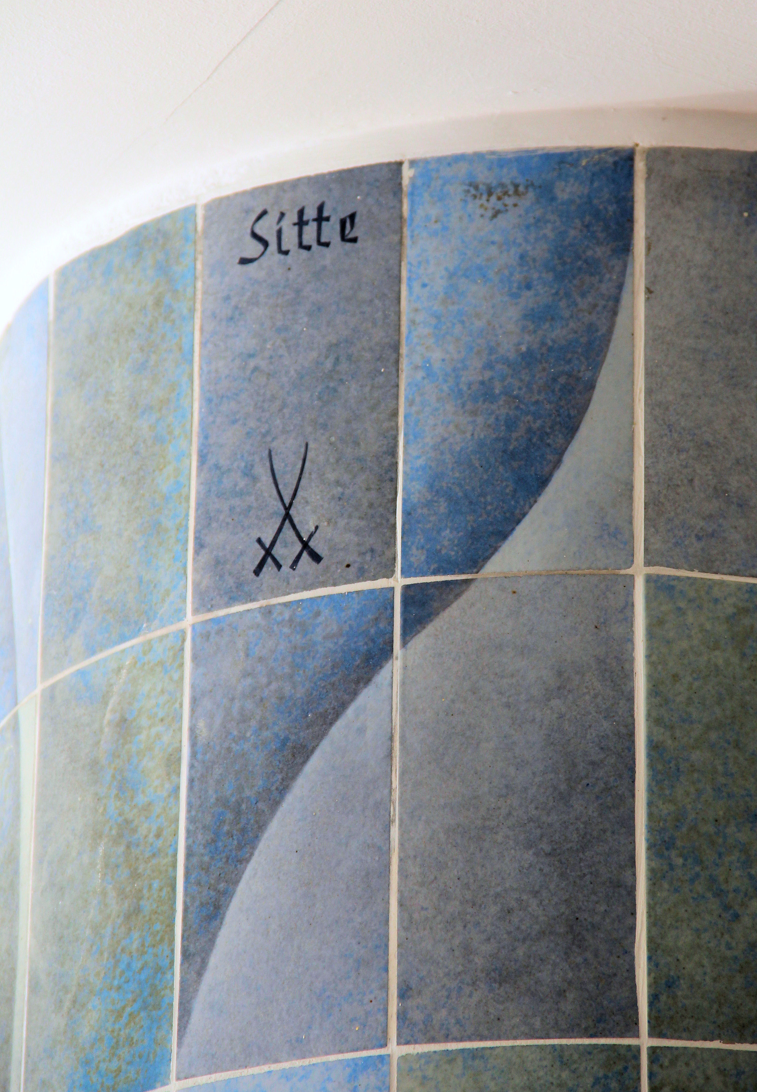 Signatur einer Säulenverkleidung von Rudolf Sitte in Dresden von 1958, Dr.-Külz-Ring 13